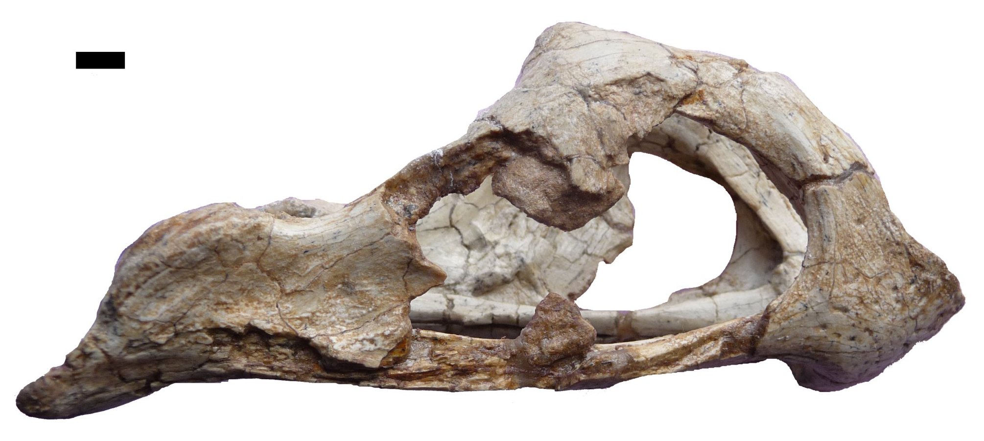 Nemegtomaia barsboldi (GIN100/2112) lower jaw. Scale bar = 1 cm.